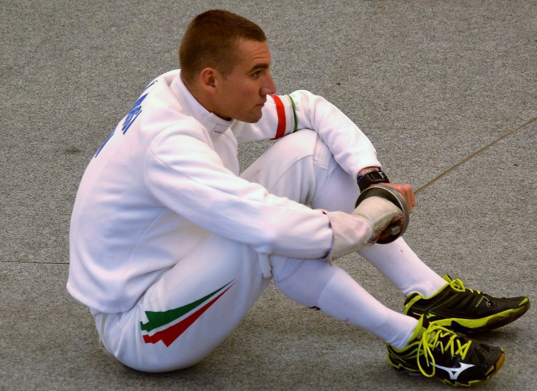 Marosi Ádám világbajnok, olimpiai bronzérmes magyar öttusázó